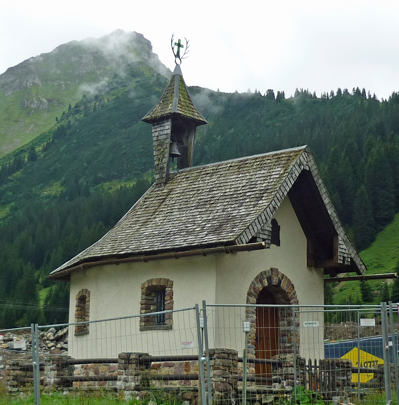 Rellskapelle Hl. Martin und Hl. Hubertus im Rellstal bei Vandans im Montafon